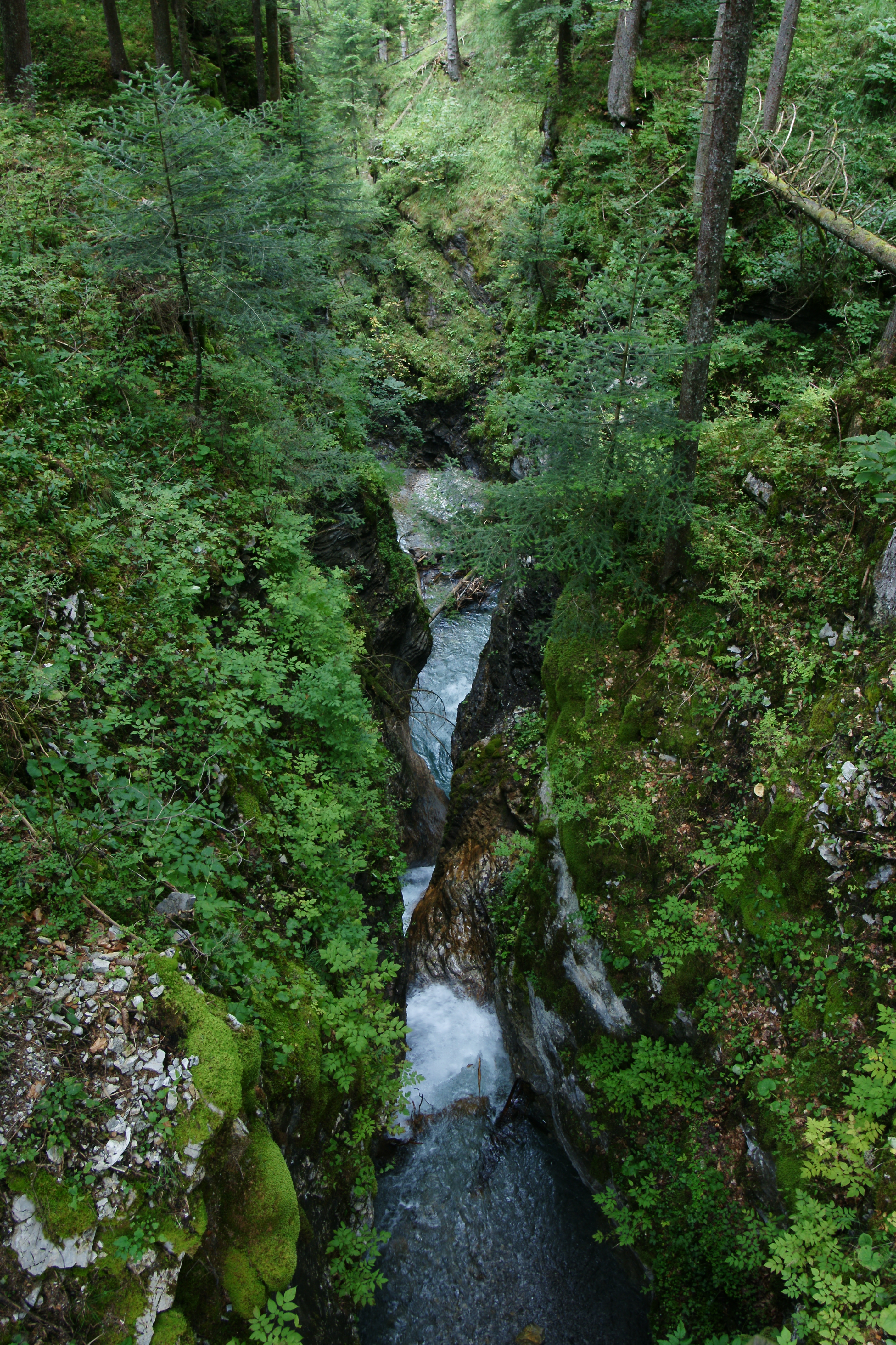 Der Lasanggabach, hier in der Maruler "Enge" bei Raggal im grossen Walsertal, mündet in die Lutz.